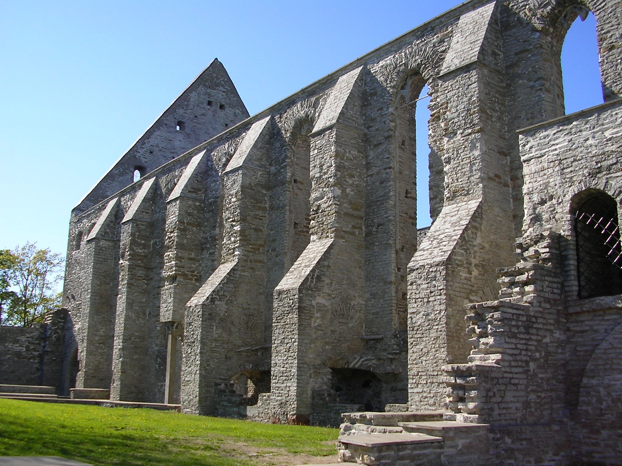 Ruinen des St. Brigittenklosters in Tallinn